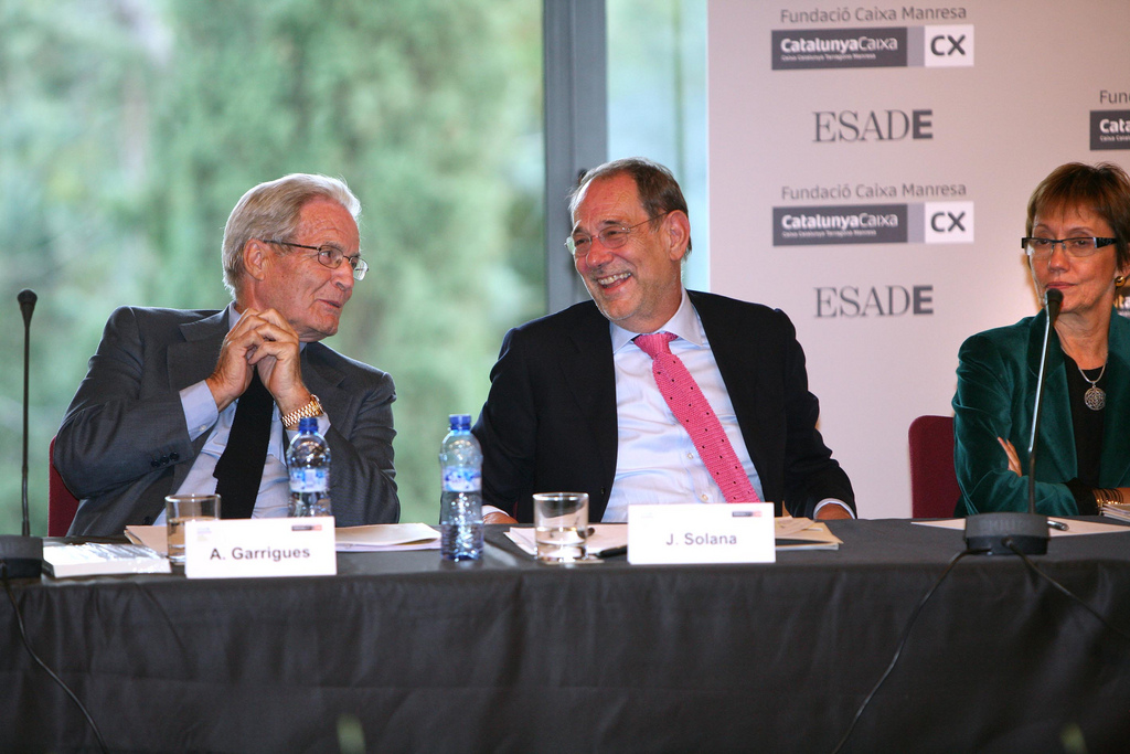 El profesor de ESADE Javier Solana departe con Antonio Garrigues Walker ante la mirada de la directora general de ESADE, Eugenia Bieto.